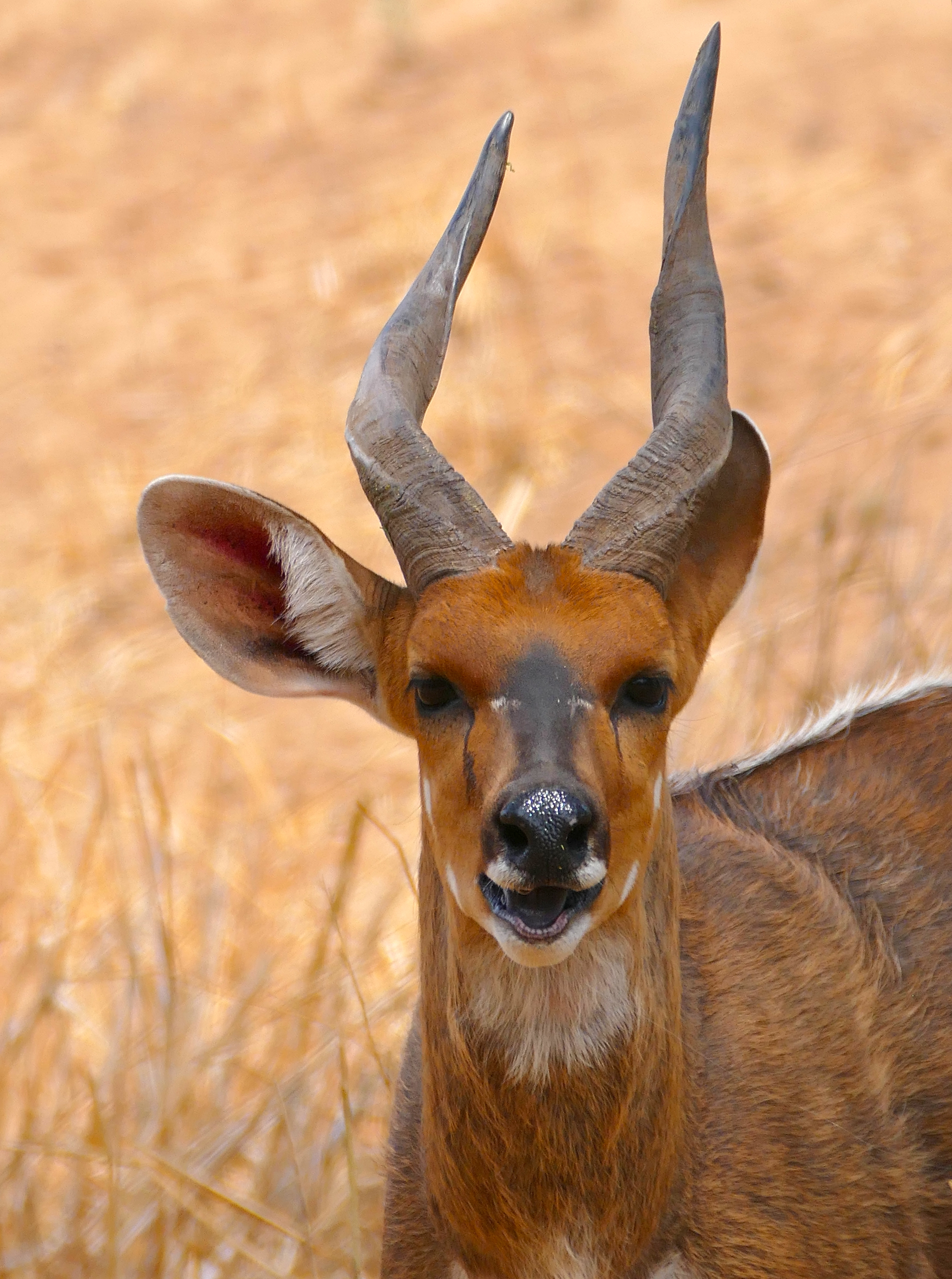 Mazhou Camping Site, Mapungubwe NP, Limpopo, SOUTH AFRICA